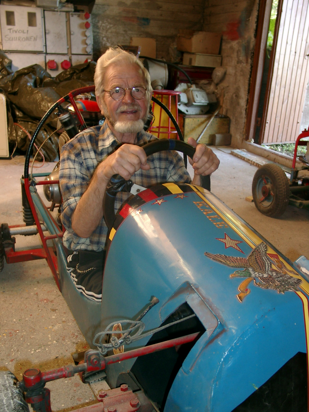 Surmanajaja Onni Suuronen surmanajoautossaan 2003